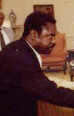 Martin Bongo